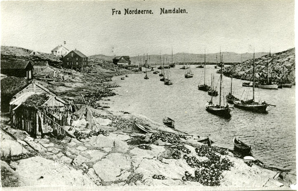 Prospektkort fra Nordøyan etter 1910. Ukjent fotograf. Unknown source: "Kystmuseet i Nord-Trøndelag"!